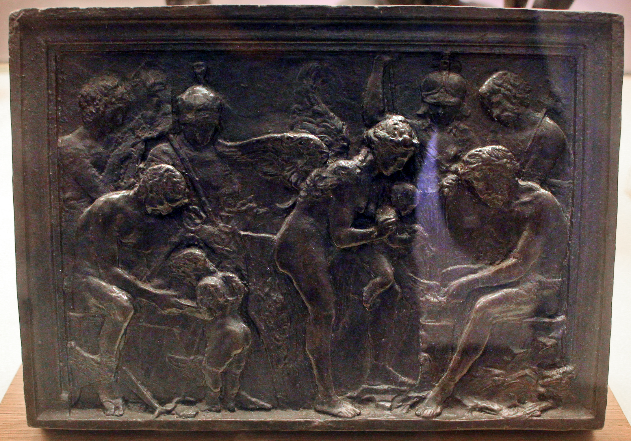 Galleria G. Franchetti alla Ca' d'Oro - MIBAC This is a photo of a monument which is part of cultural heritage of Italy.